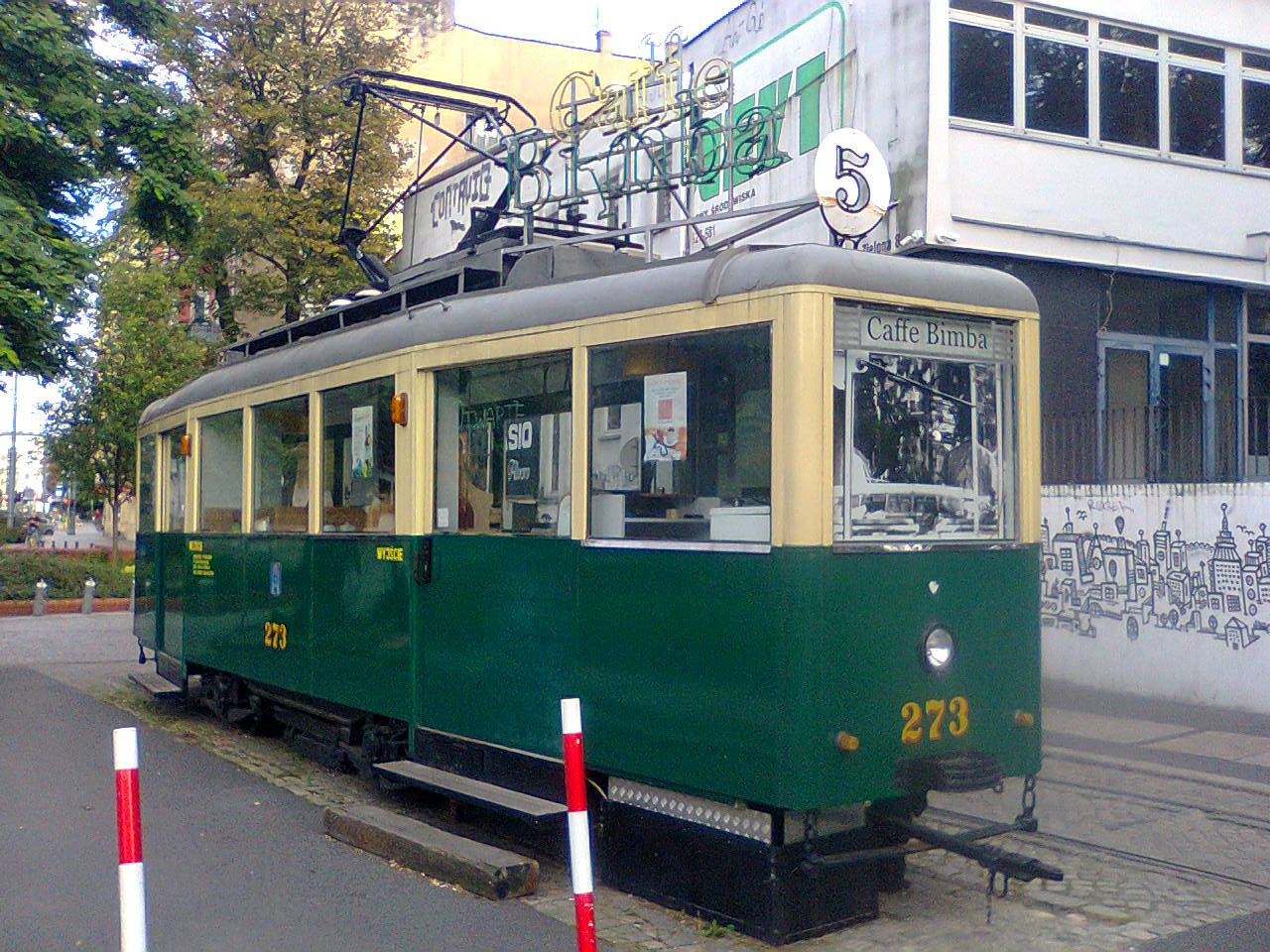 Cafe Bimba, ul. Zielona, Poznań